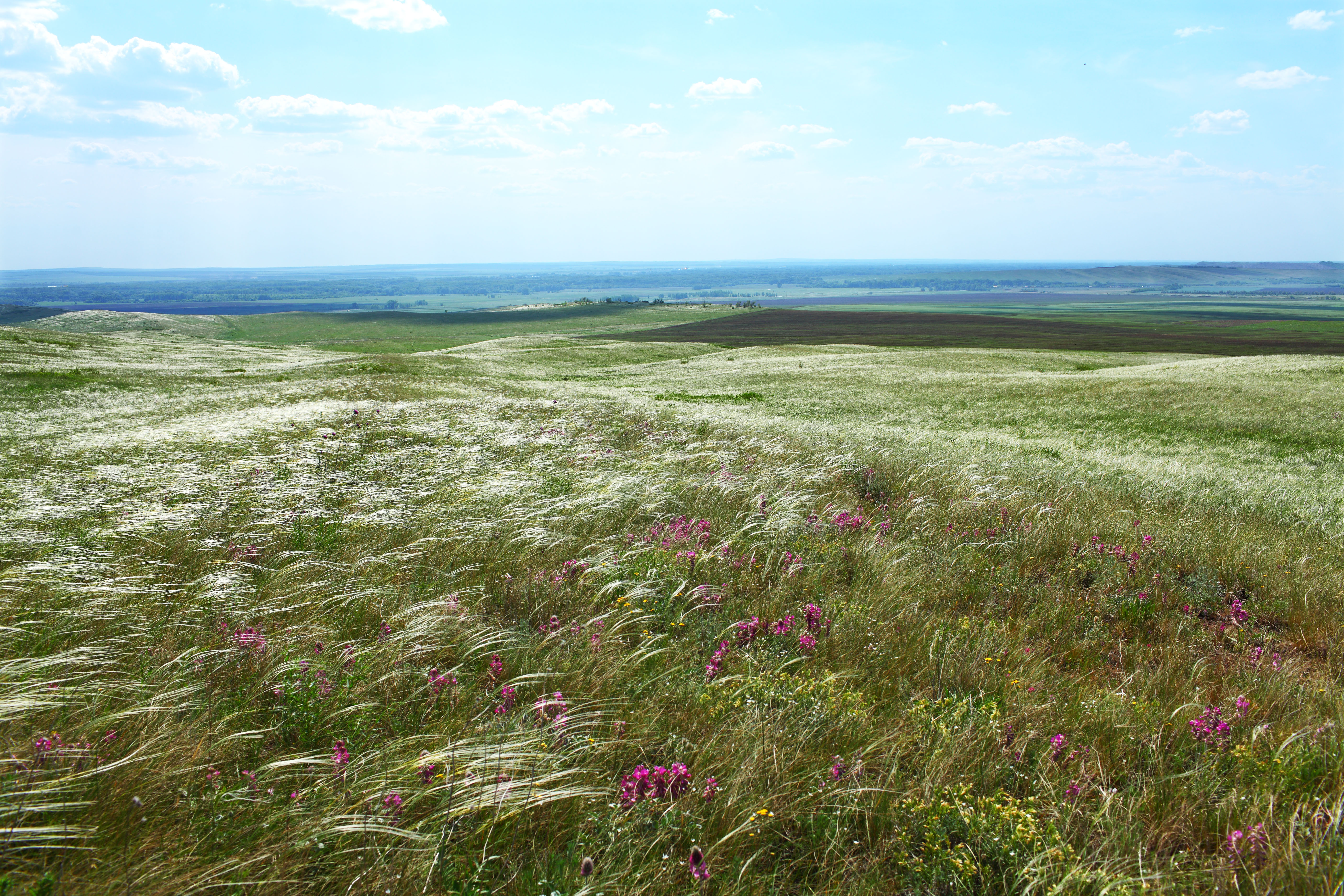 Ковыльная степь в пору цветенья